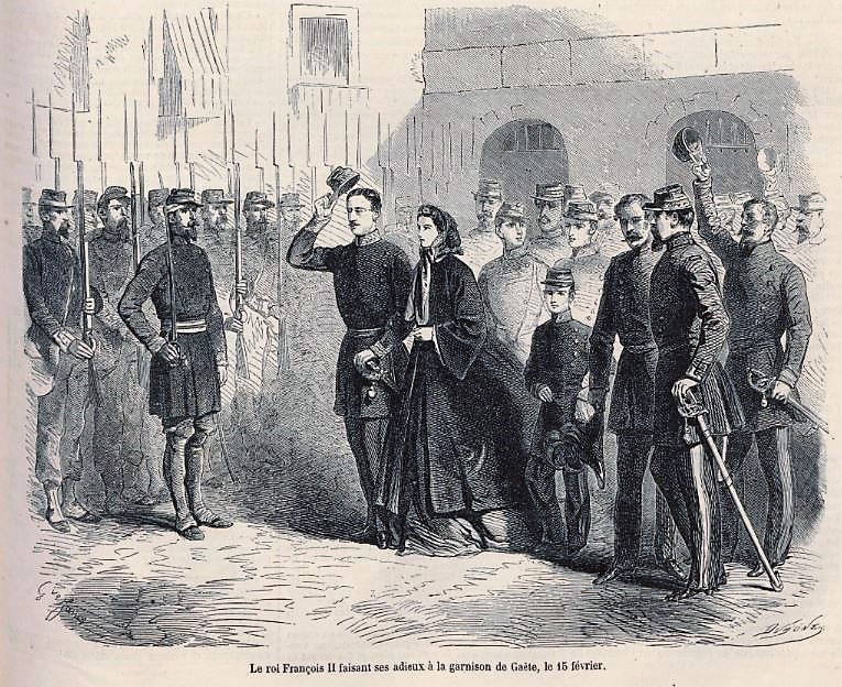 disegno da testo del 1860 - Francesco II lascia Gaeta